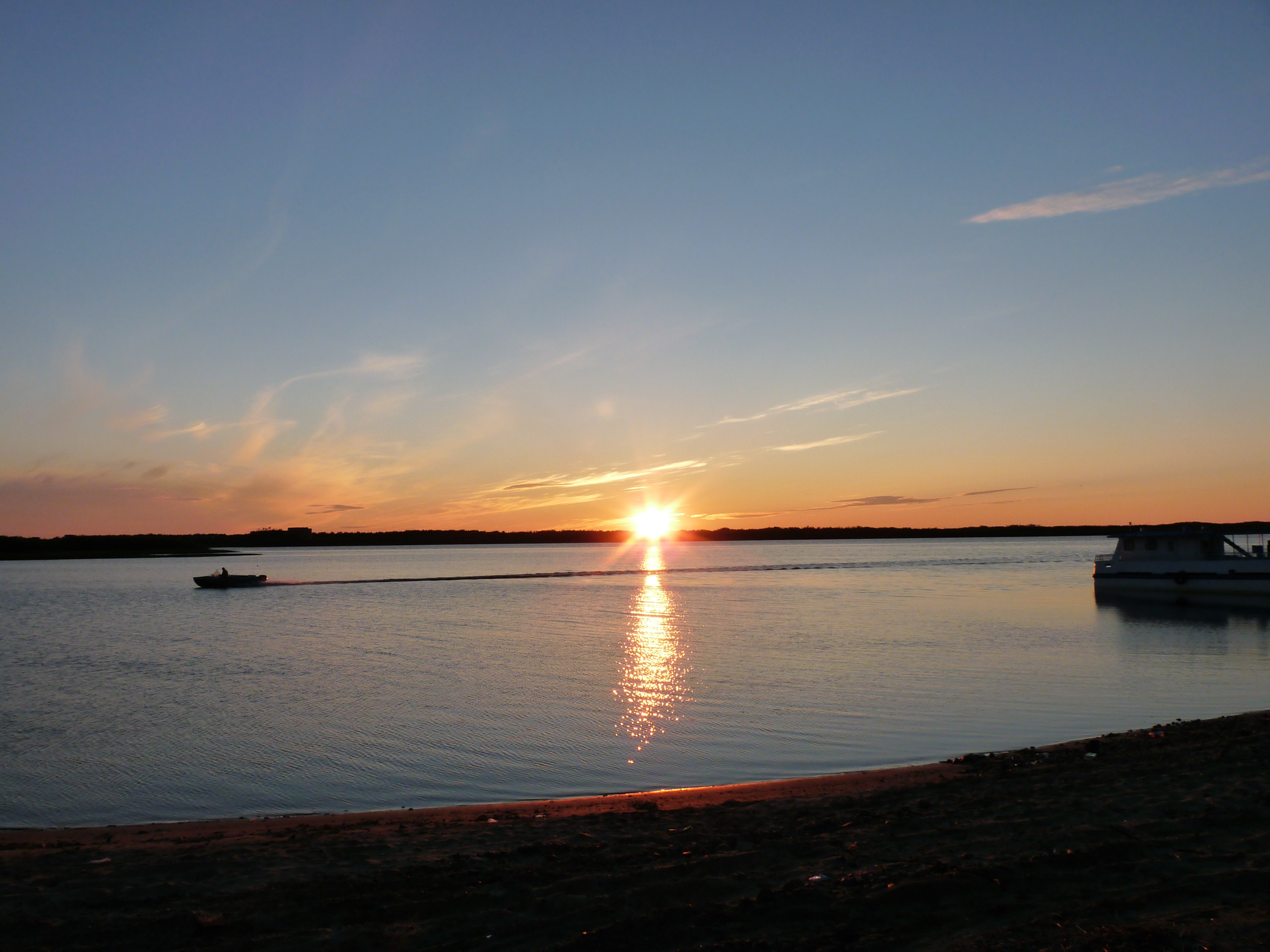 Лодка на реке Печора. Белая ночь (полпервого ночи МСК).